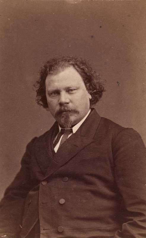 Brynjulf Bergslien, portrett, mann, billedhugger, brystbilde.